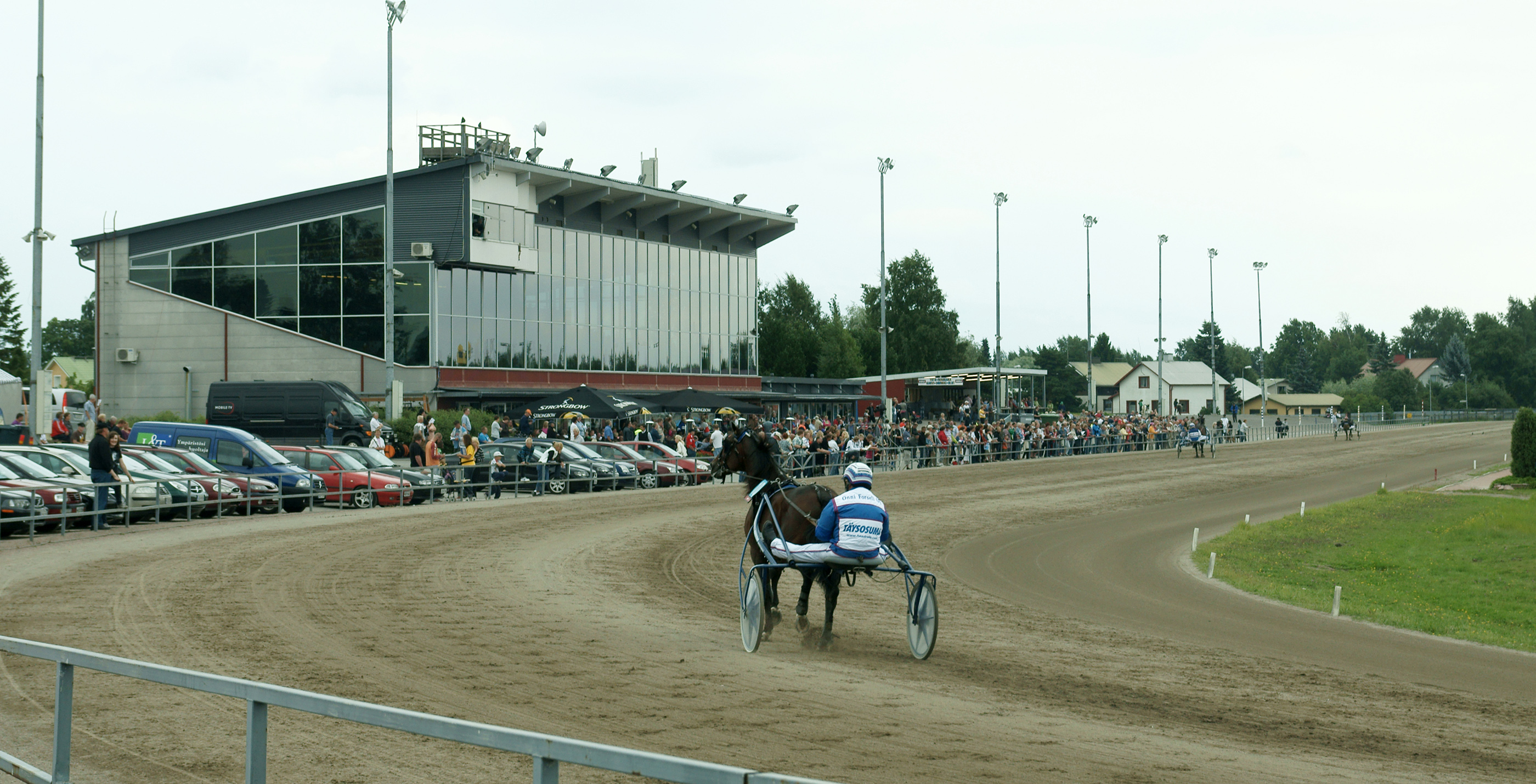 Porin raviradan katsomoalue elokuussa 2011.